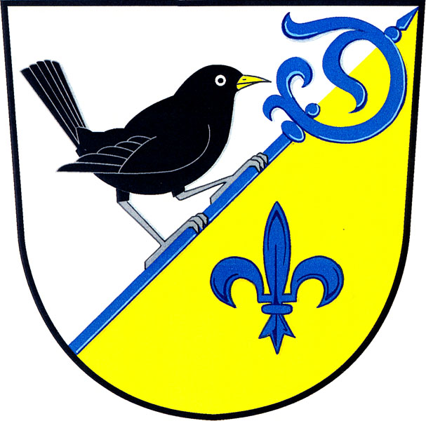 Znak obce Stranný